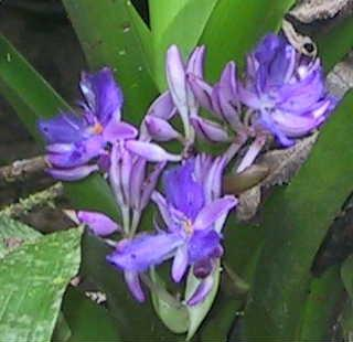 Blüte von Cochliostema odoratissimum Ausschnitt aus File:Cochliostema odoratissimum 2006 93 12.JPG